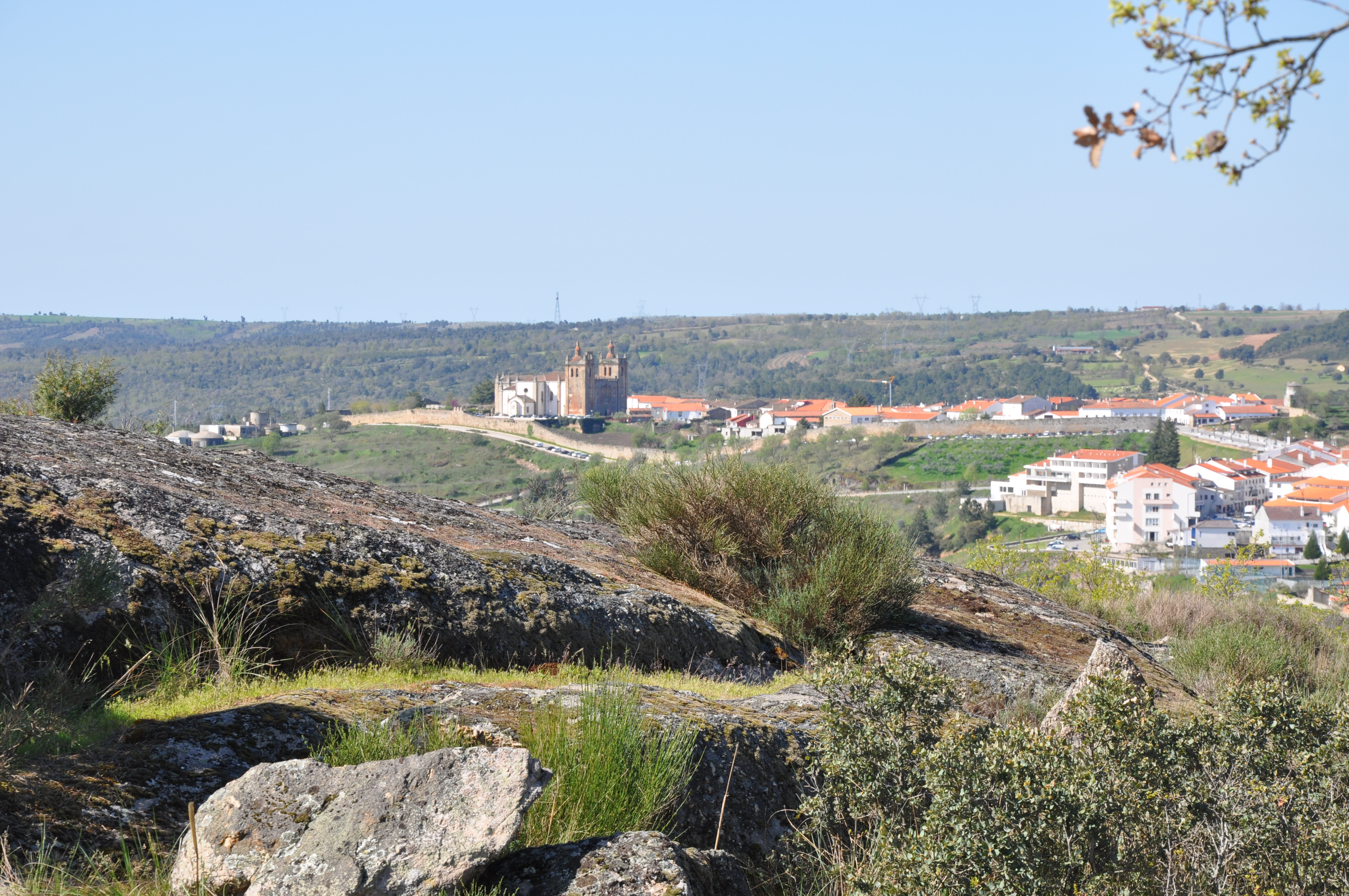 Panorámica de Miranda del Duero, Portugal.